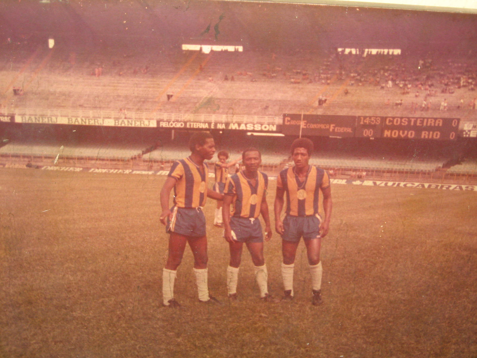 Equipe do Novo Rio FC em 1979, no Maracanã, em final contra o EC Costeira.